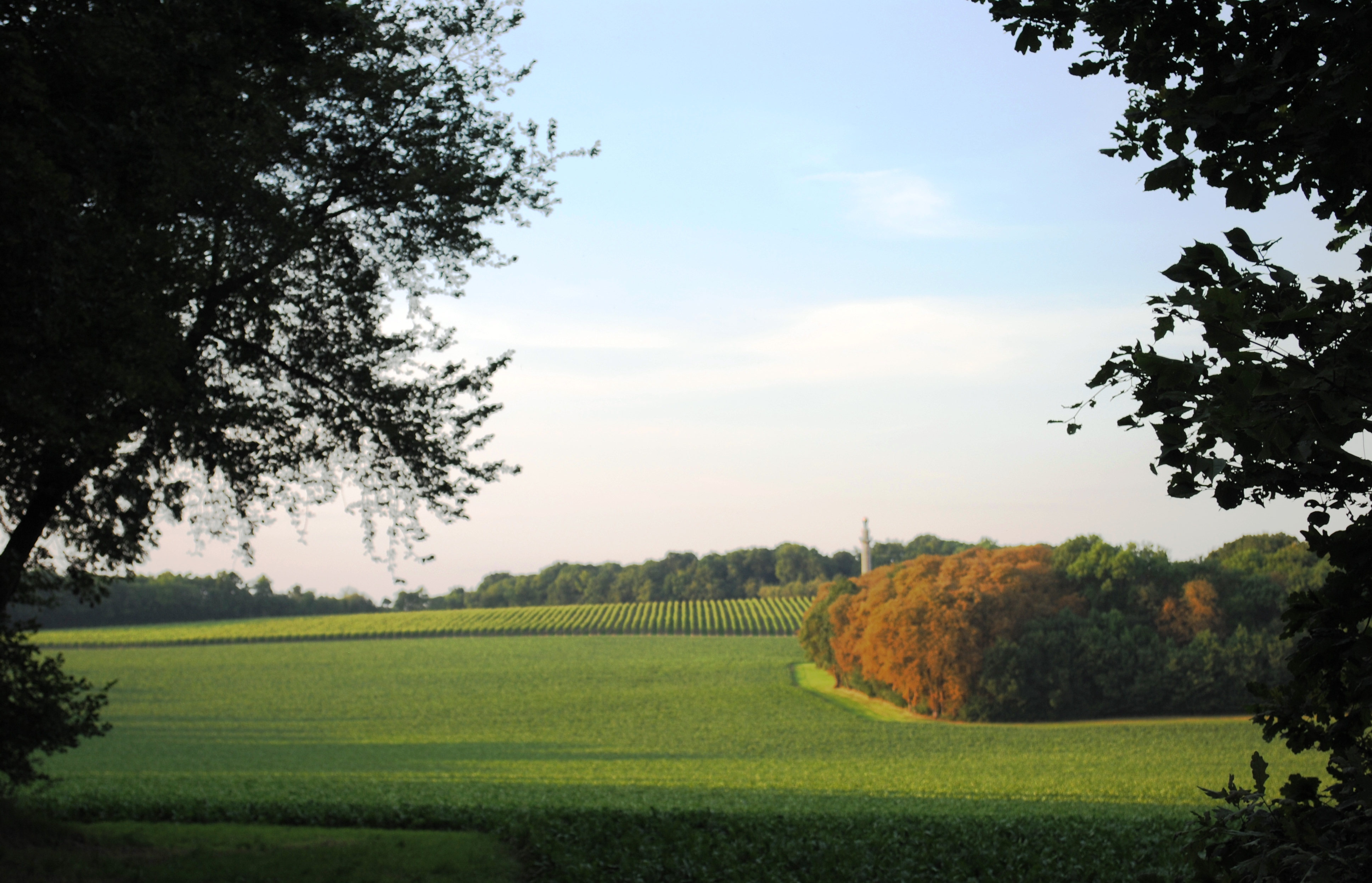 Gaibacher Schlosspark